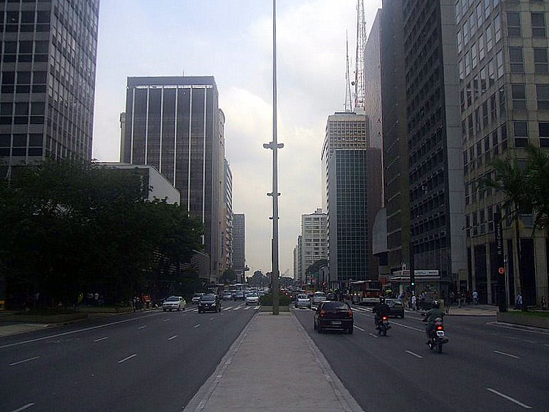 Avenida Paulista, São Paulo, Brasil.